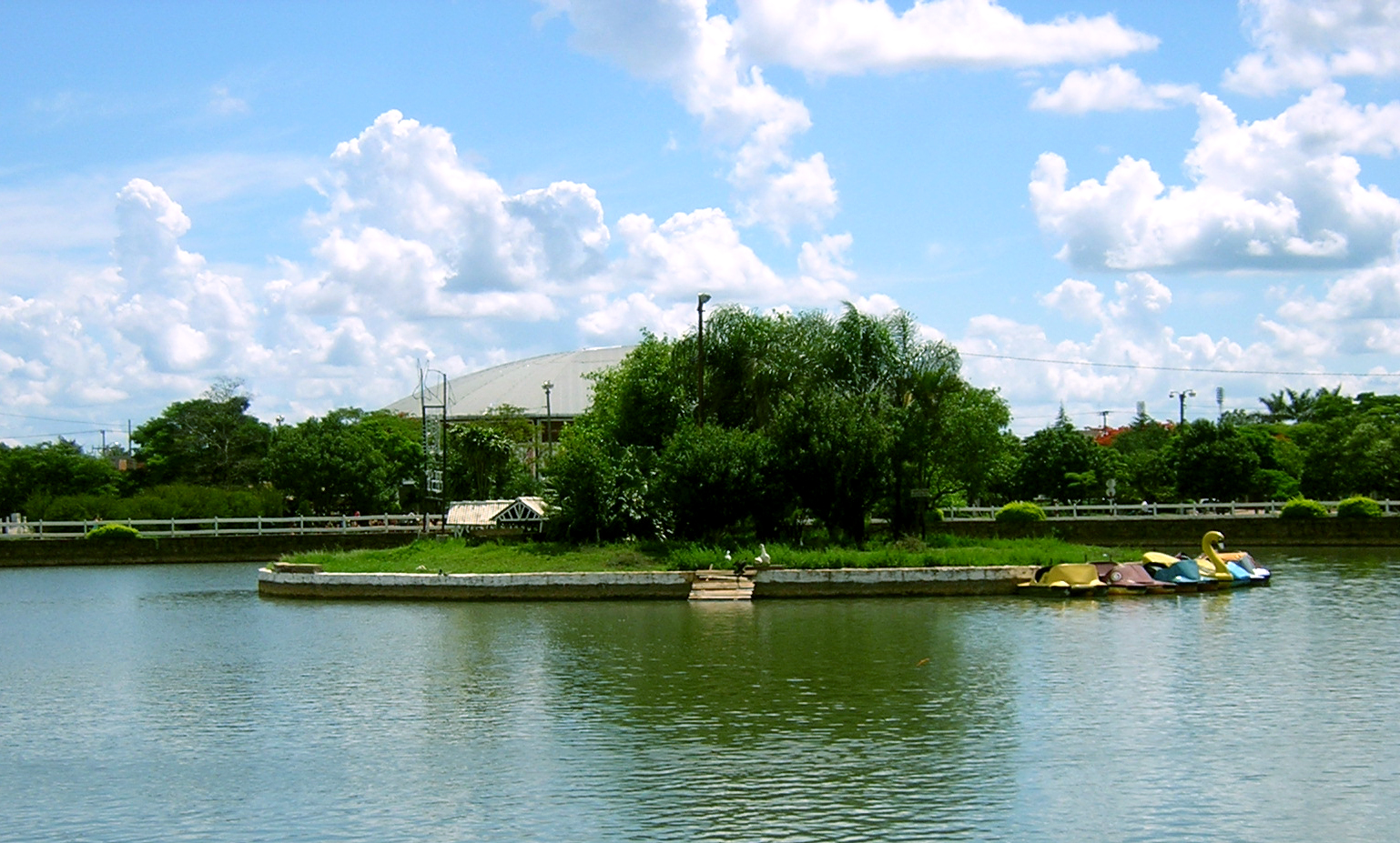 Изкуственото езеро Пунта Пора.